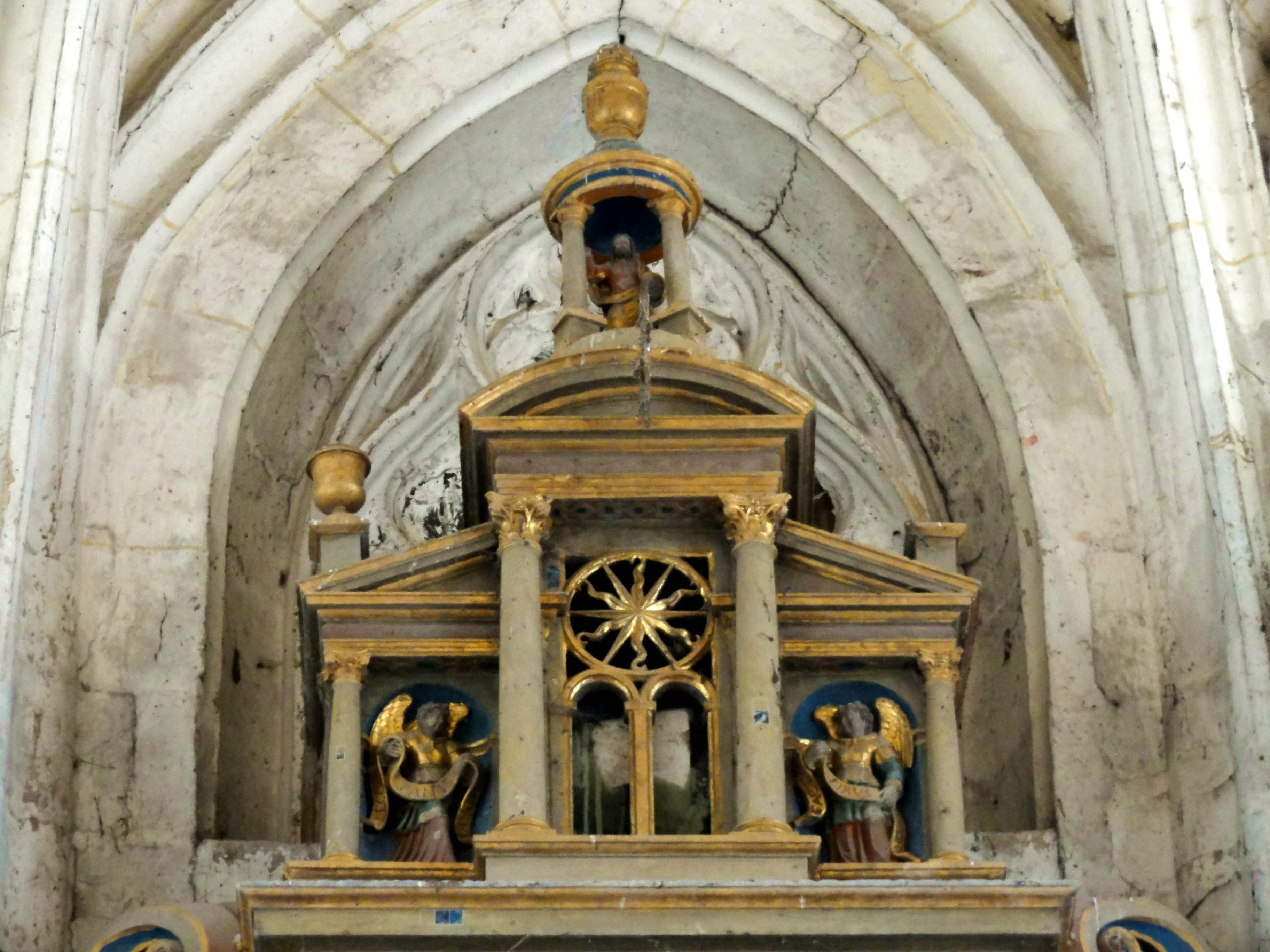 Retable du martyr de sainte Félicité et de ses deux fils, pierre calcaire polychrome, 1568.